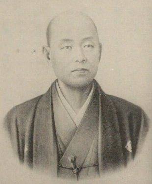 大山綱良（1825-1877）